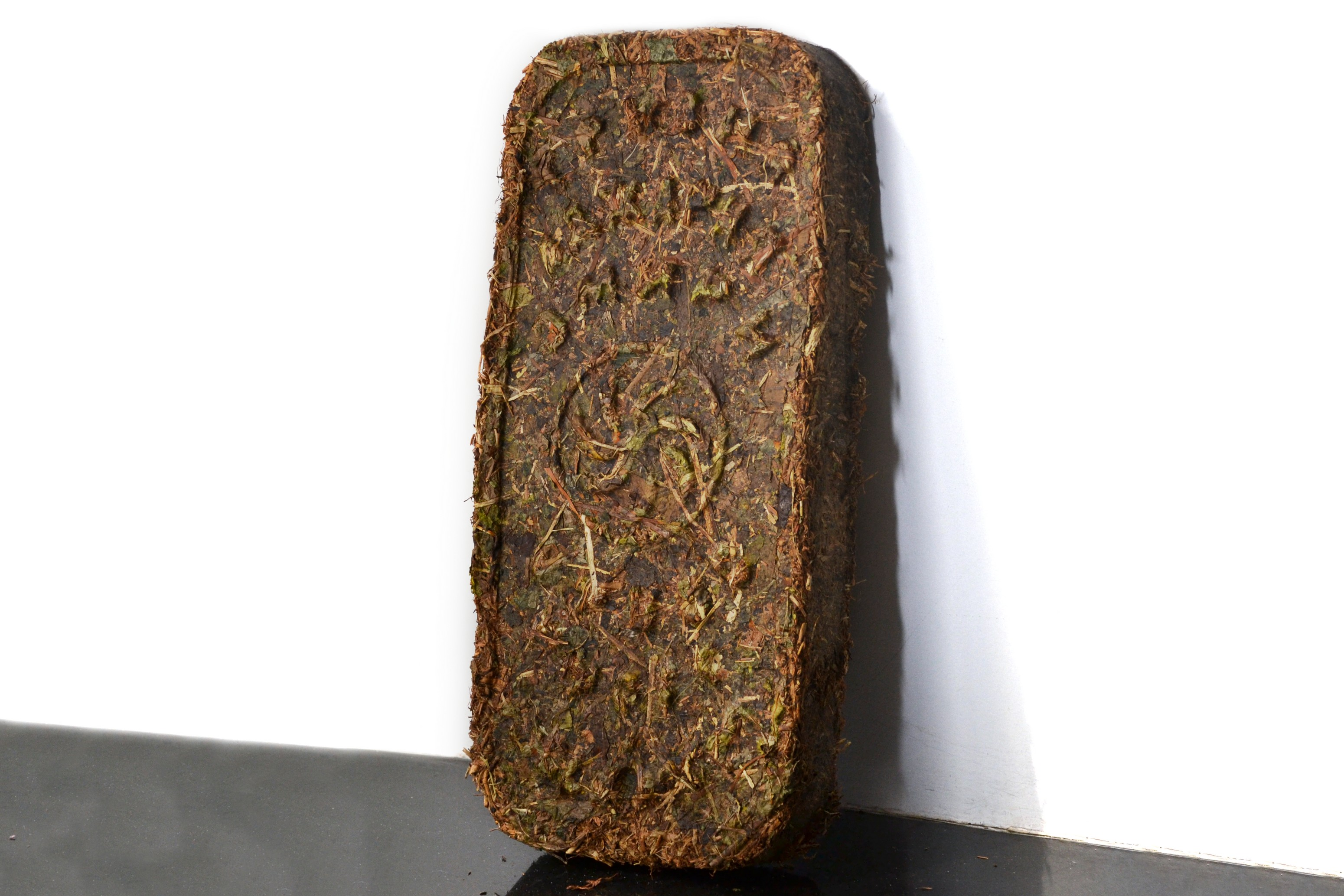 Грузинский прессованный чай.